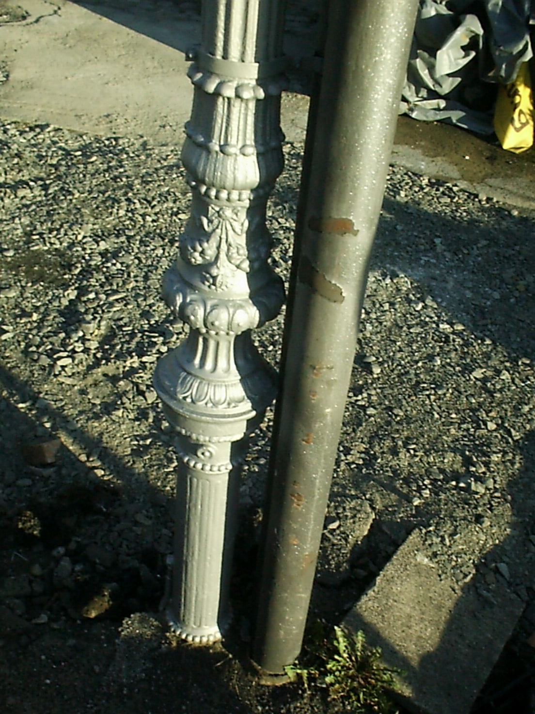 Säule der Bahnhofsvordach St. Ingbert/pillar railway station St. Ingbert, Germany